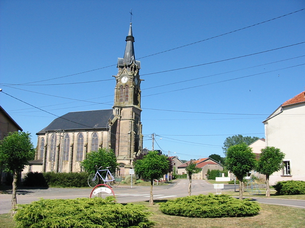 Fenneviller Commune du canton de Badonviller Photo personnelle du 17 juillet 2006. Copyright © Christian Amet